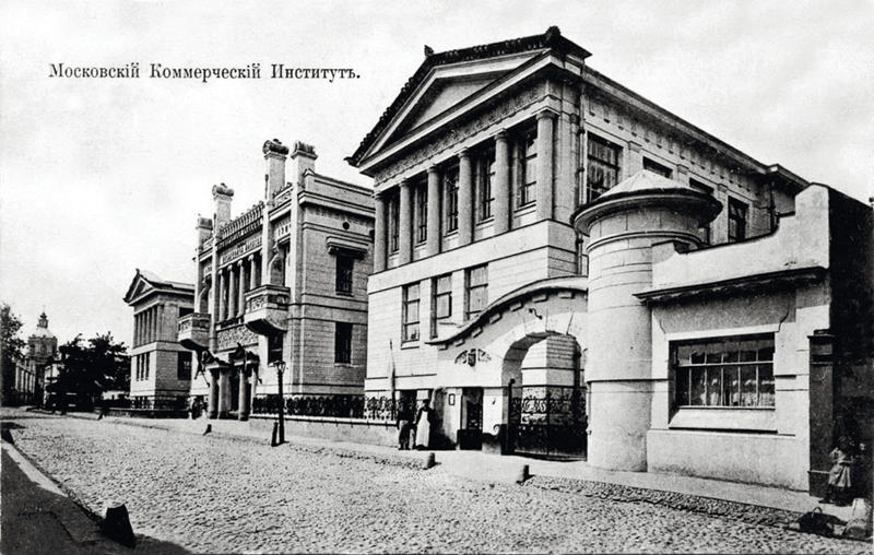 Московский коммерческий институт (1907-1917) - первое высшее экономическое учебное заведение Российской империи.